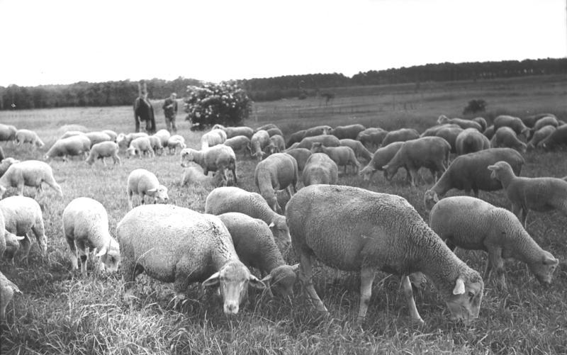 Zurück in deutsche Hände. (Übergabe von Gut Großbeeren (Kreis Teltow) durch die SMA) Auch eine große Schafherde gehört zu dem jetzt volkseigenen Gut. Aufn.: Illus/Heilig 3499-49 27.6.49